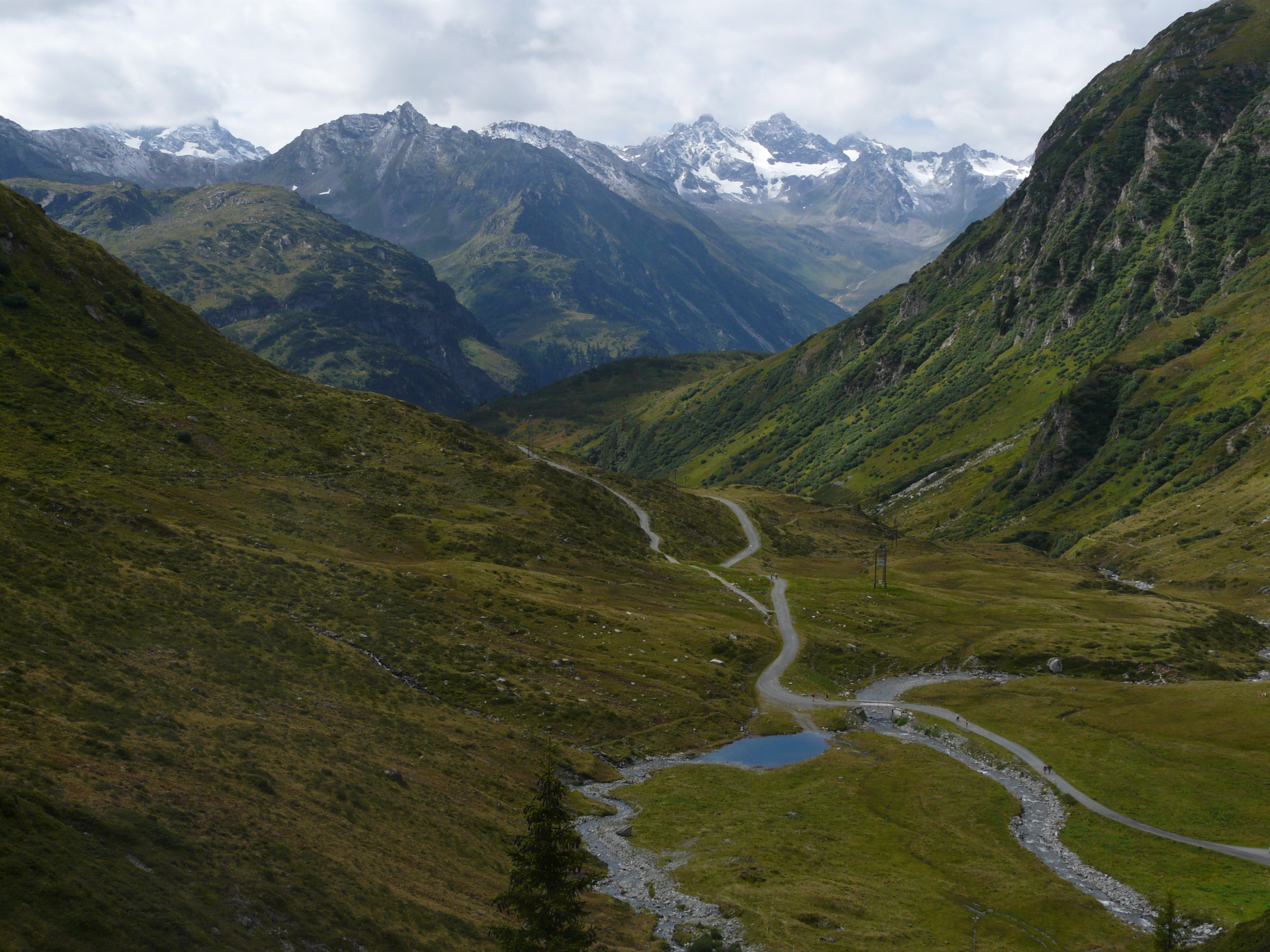 Verbellatal (Blick von der Verbellaalpe). Im Hintergrund rechts von der Bildmitte der Großlitzner und etwas weiter rechts das Große Seehorn